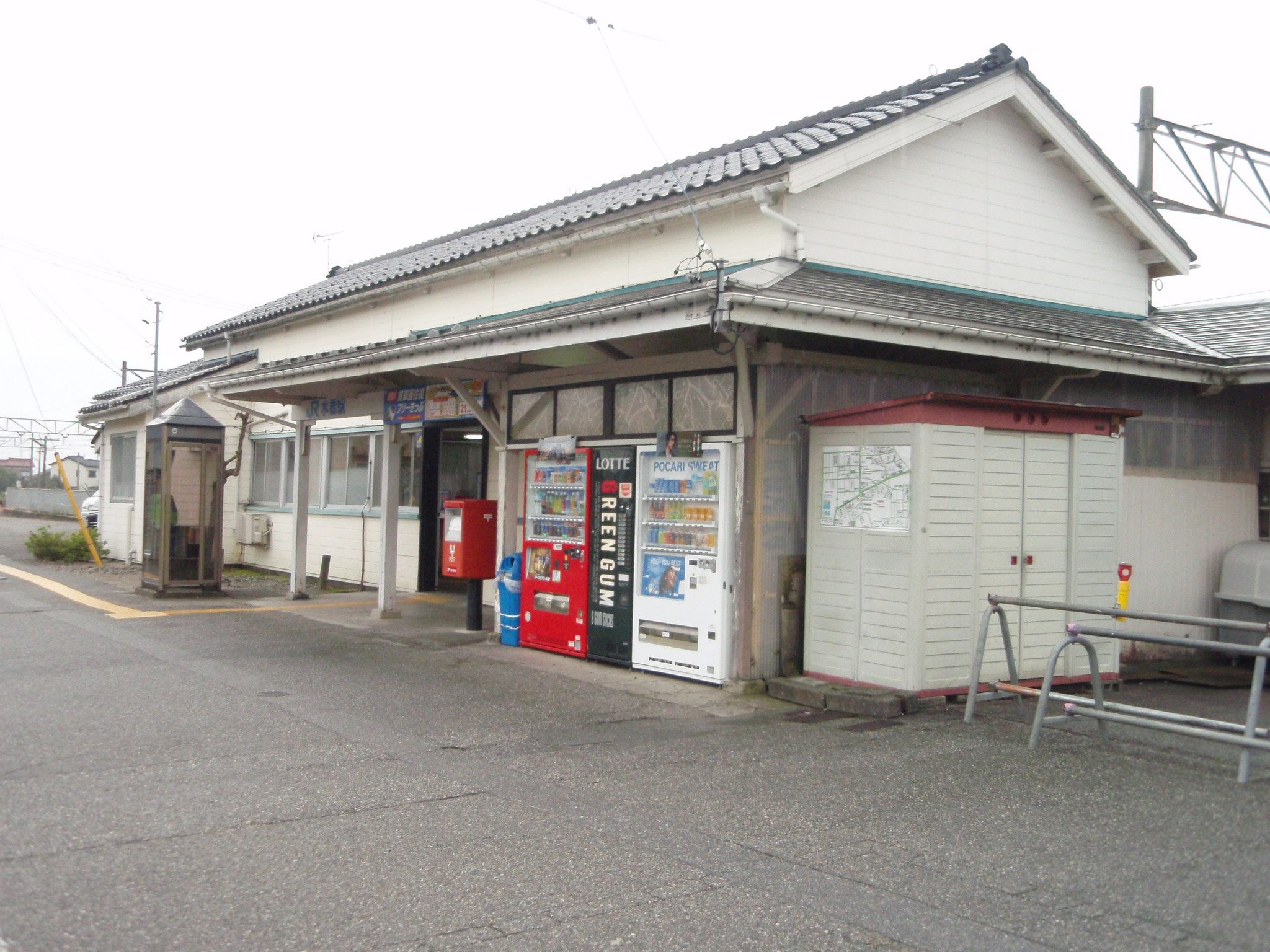 水橋駅 正面外観